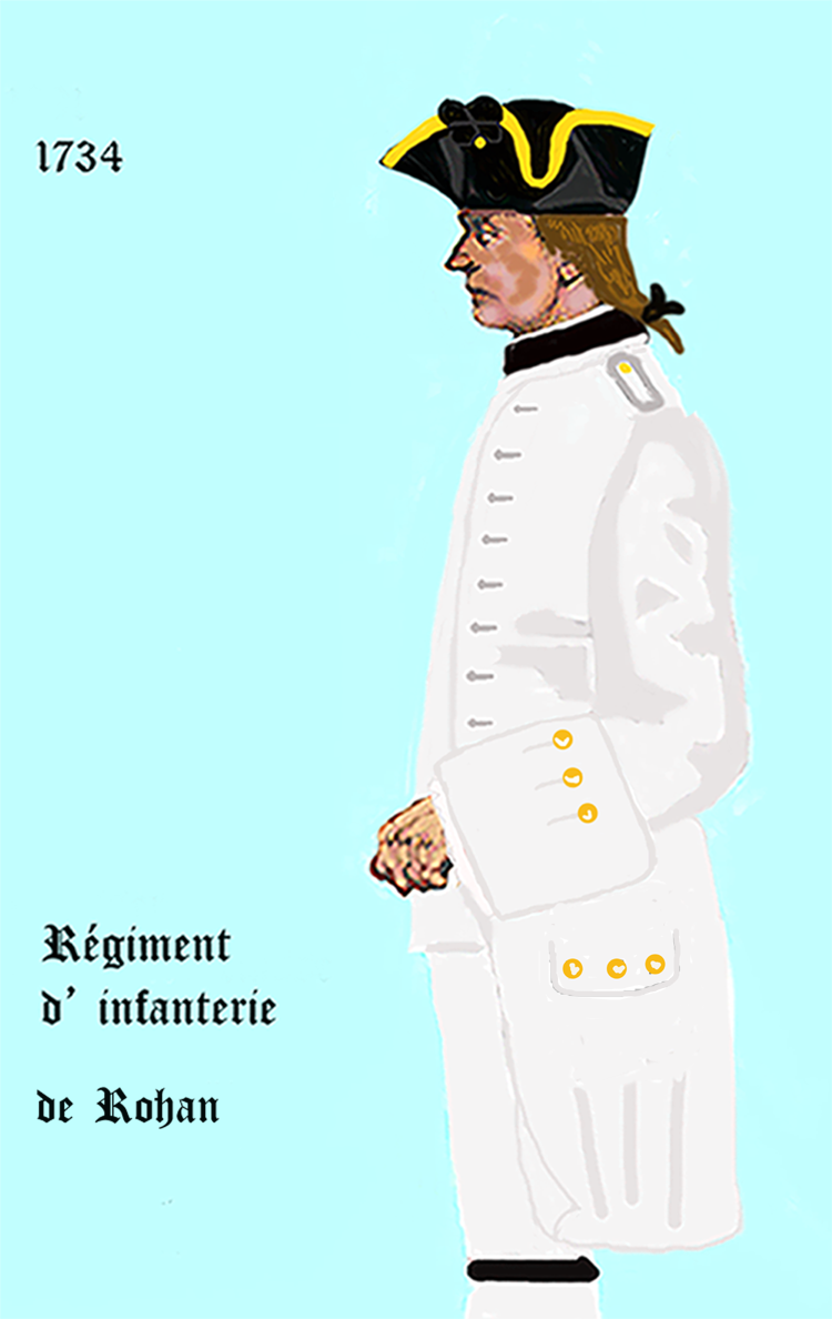 Uniform eines königlich französischen Infanterie-Regiments gemäß Dekret von 1734. - Entnommen und überarbeitet aus: „LES UNIFORMES ET LES DRAPEAUX DE L'ARMÉE DU ROI“ Marseille 1899.